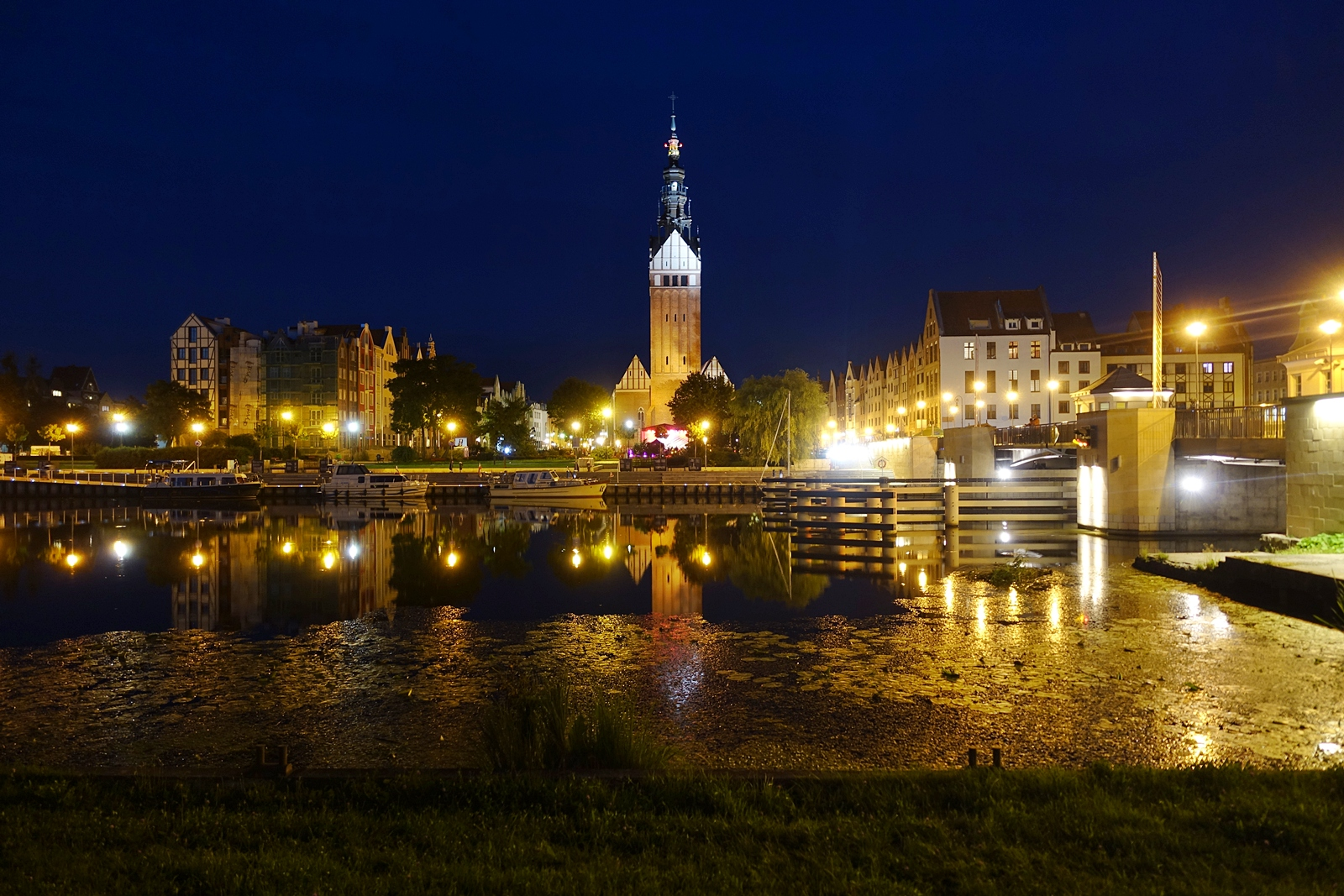 Elbląg - Nocny widok na Stare Miasto zza rzeki Elbląg